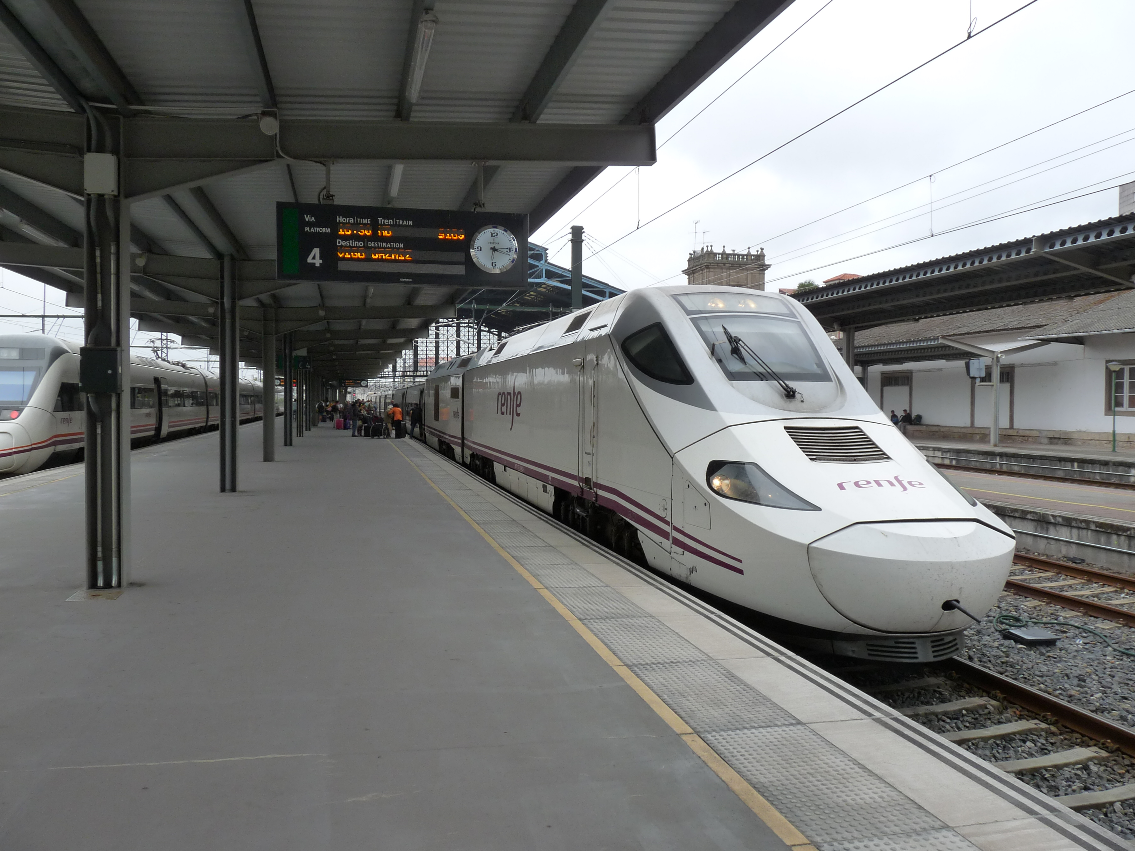 Aangekomen trein uit Madrid